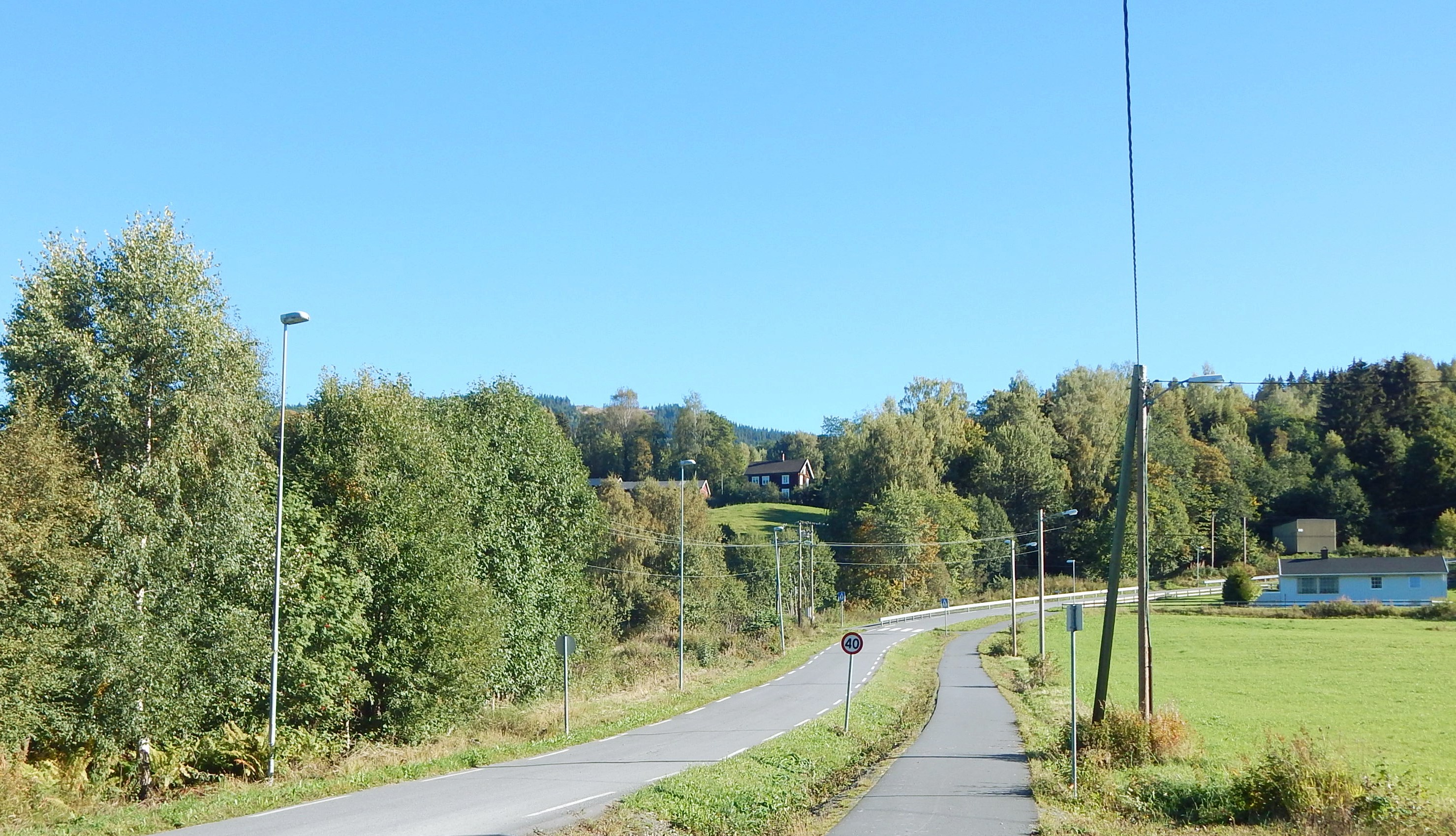 Buvollvegen (arm av fylkesvei 2528, tidl. 315) i Rudsbygd